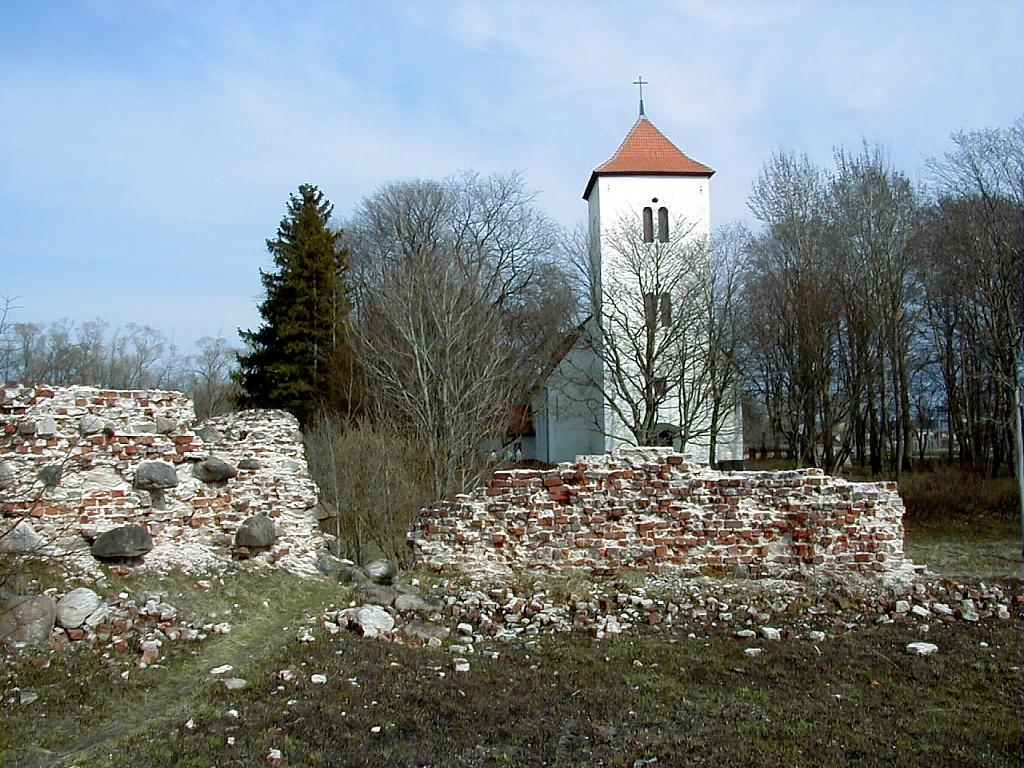 Piltene/Pilten in KurlandLatviešu: Piltene